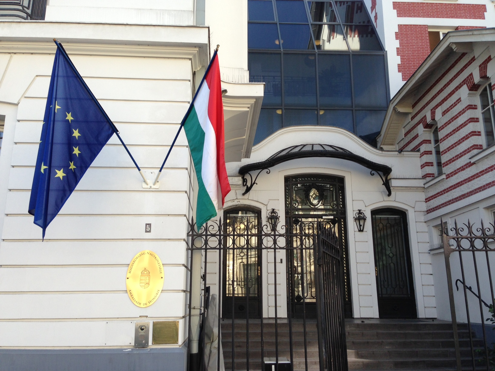 Photo of the current building of the Hungarian Embassy in France